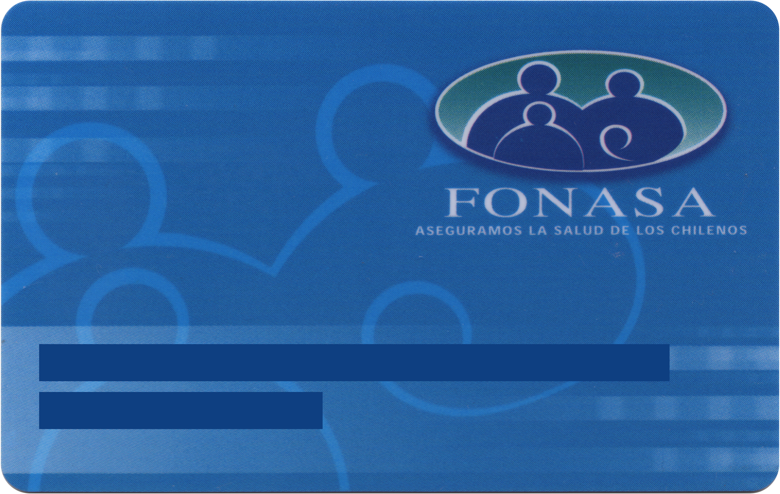 Una credencial emitida por el Fondo Nacional de Salud (FONASA) a sus beneficiarios en Chile.